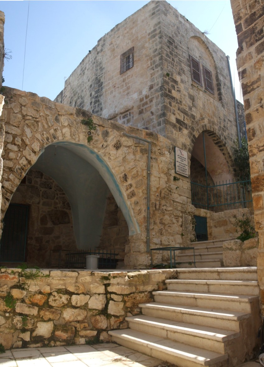 من داخل البلدة